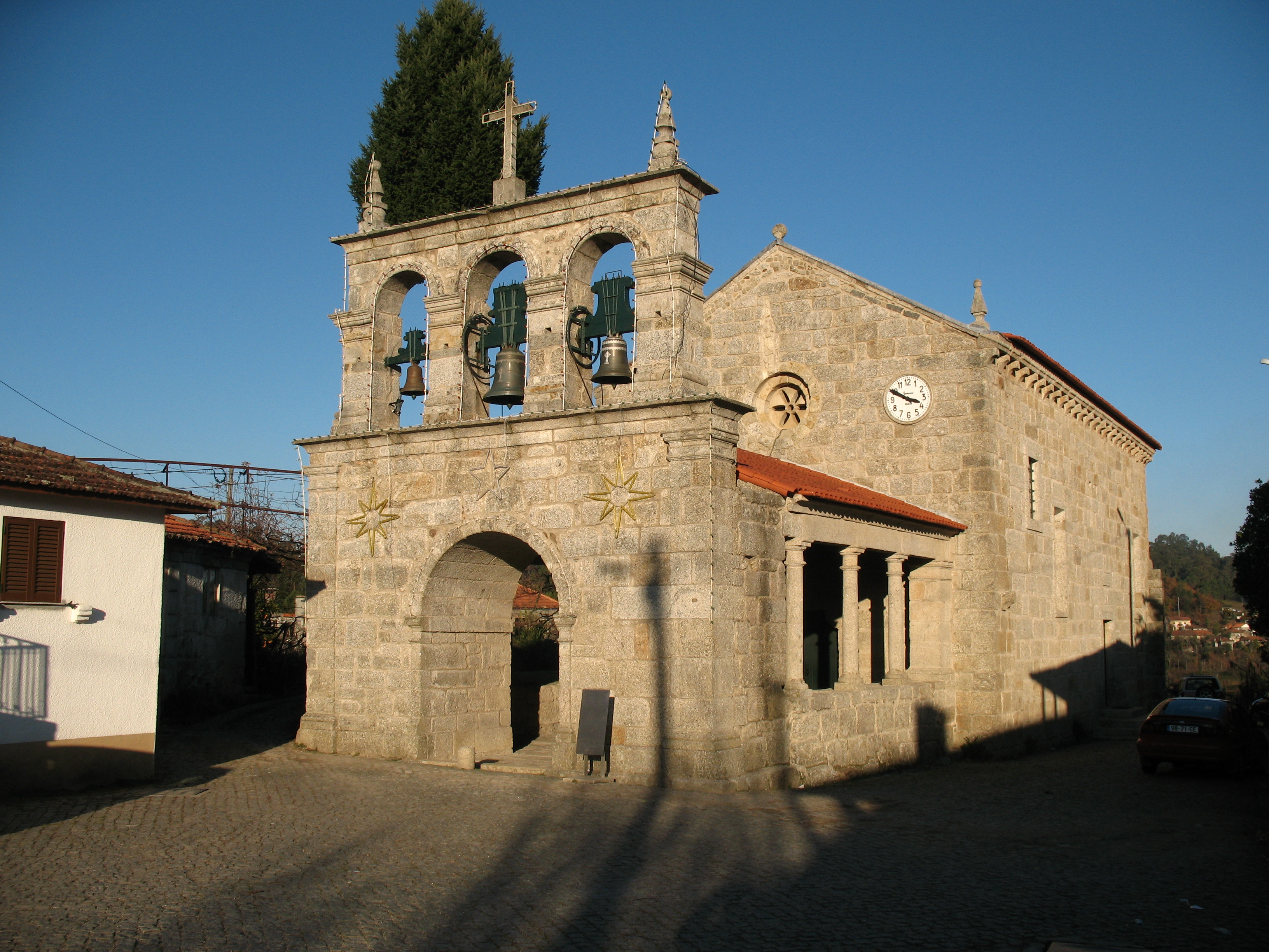 Amarante Igreja Românica de Telões